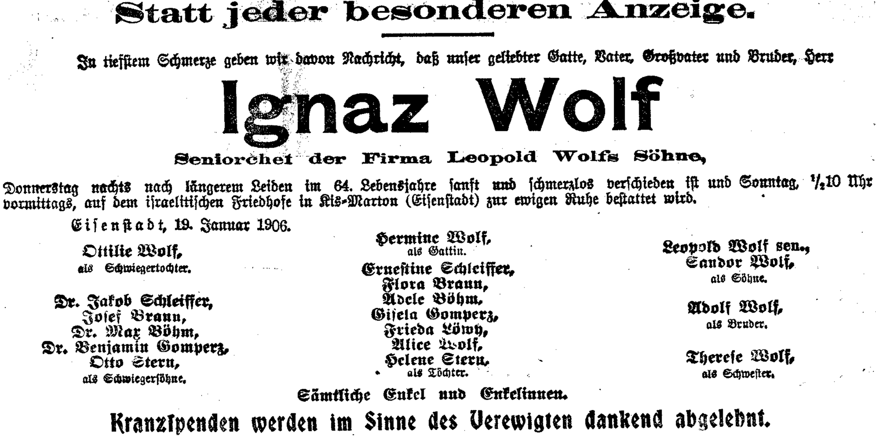 Todesanzeige für Ignaz Wolf, Inhaber des Unternehmens Leopold Wolf’s Söhne